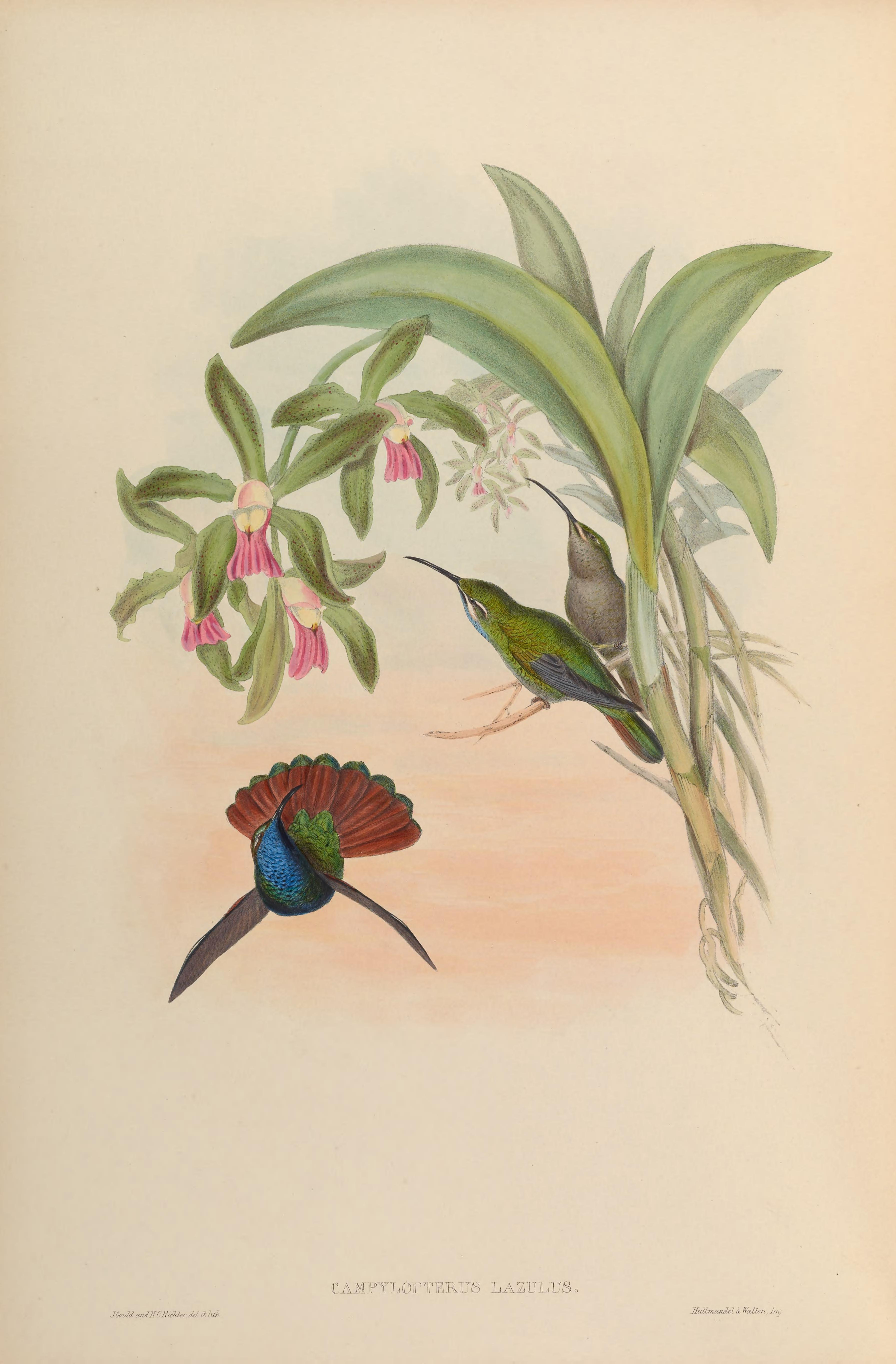 Campylopterus lazulus = Campylopterus falcatus [1]